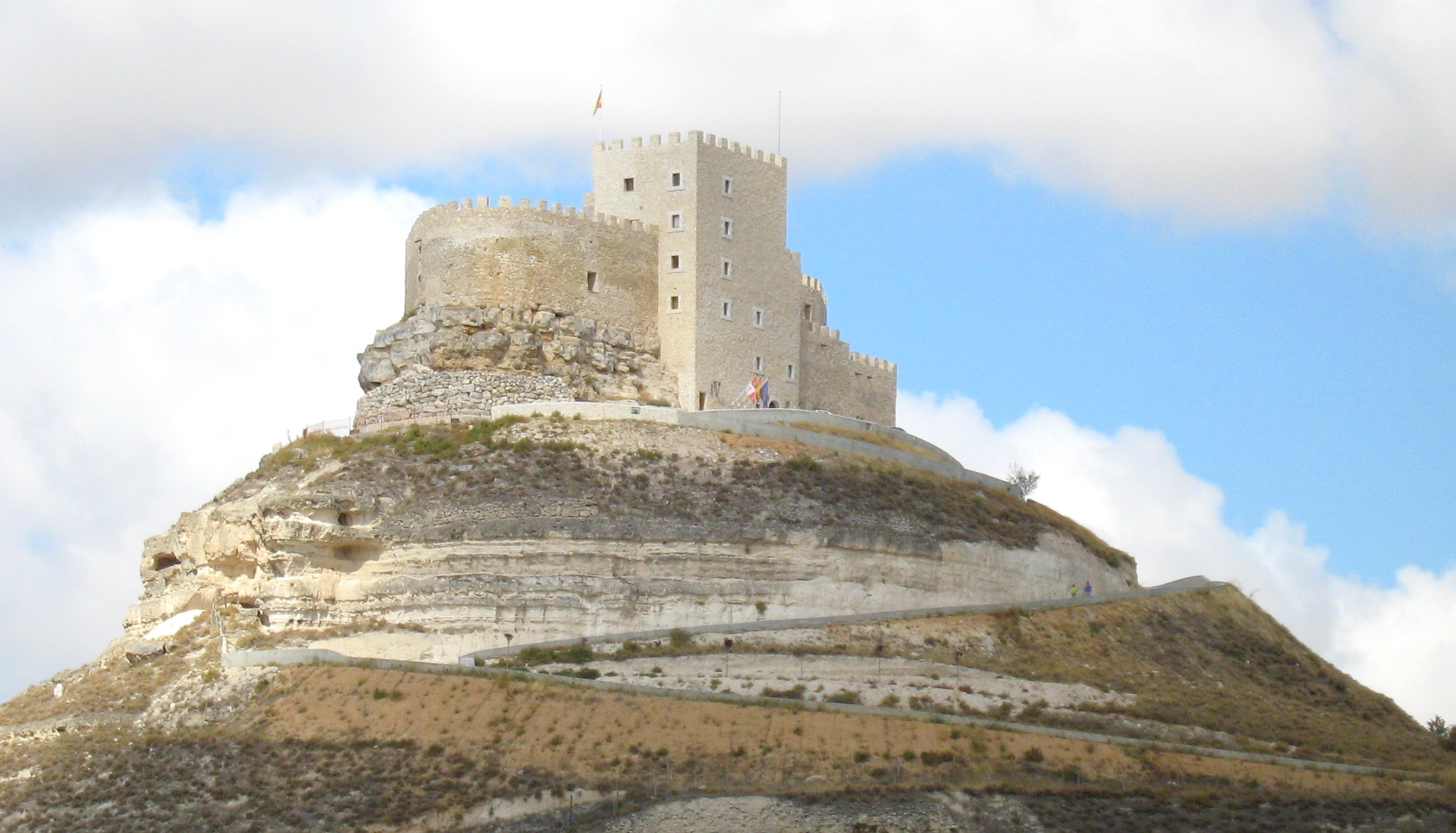 Curiel de Duero. Castillo. Valle del Cuco. Valladolid